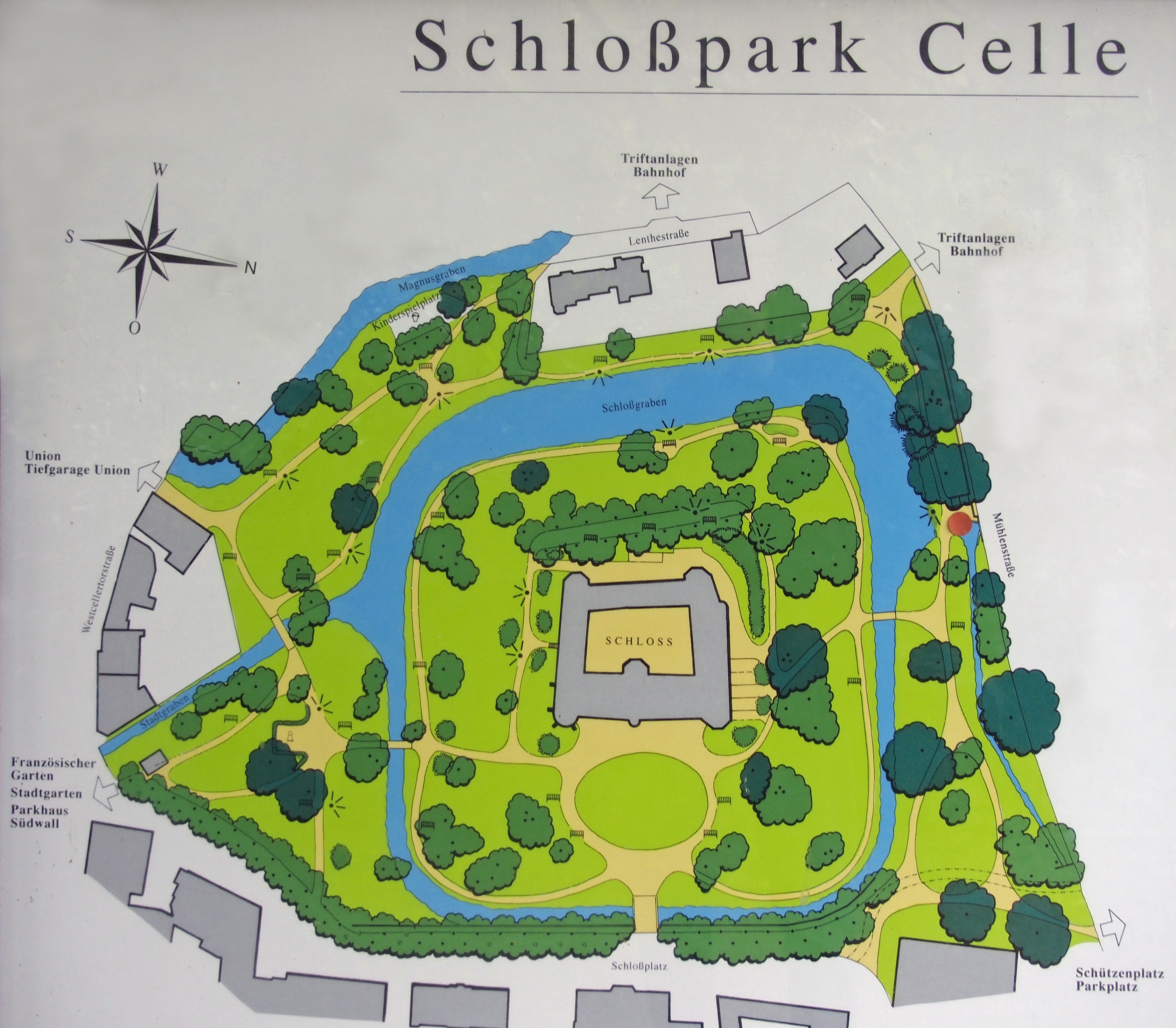 Plan des Schlossparks in Celle, Niedersachsen, Germany (Öffentliches Informationsschild)